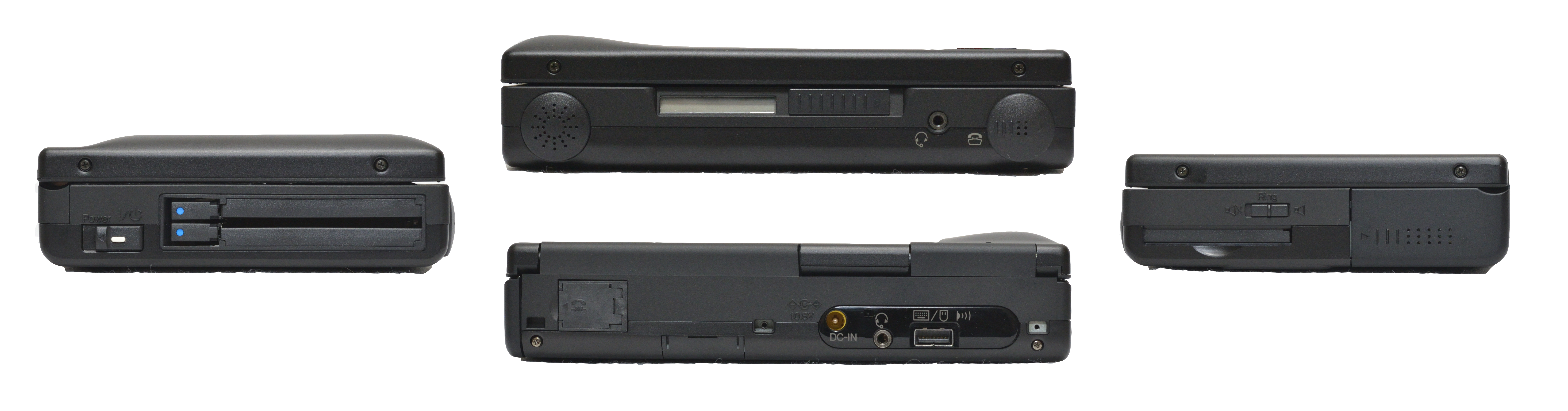 IBM Palm Top PC 110 横側（前、後、左、右）